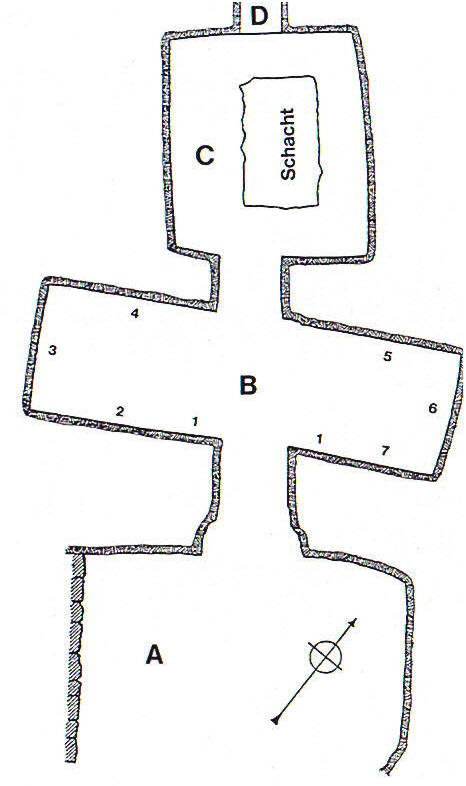 Grundriß des Grabes